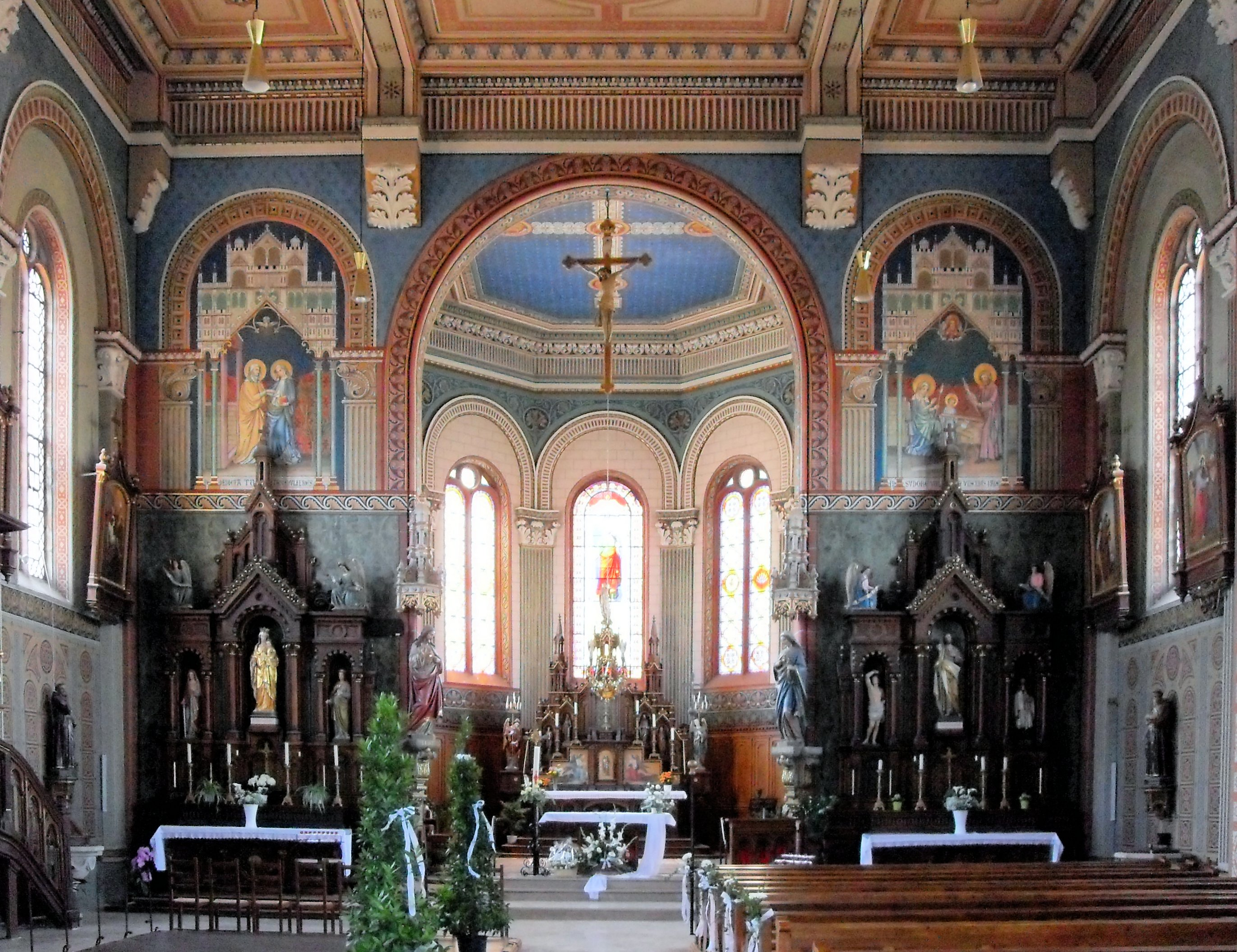 L'intérieur d'église Sainte-Lucie à Niederhergheim